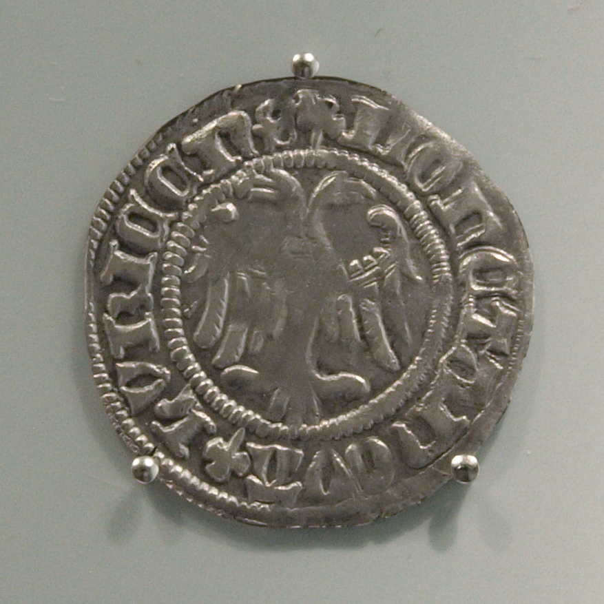 Lübeck Schilling seit 1433. Photographed at Museum für Hamburgische Geschichte, Hamburg, Germany.